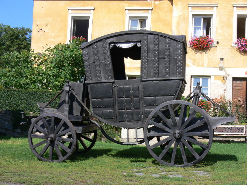 Vysoká Lhota - muzeum historických kočárů